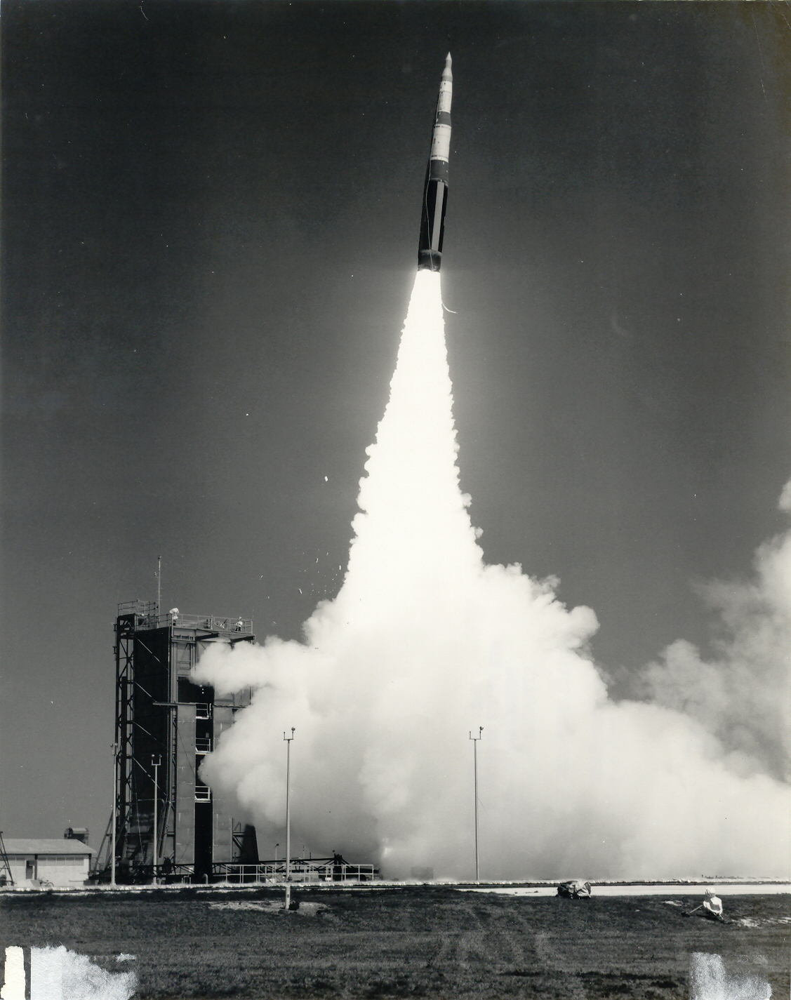 Minuteman II missile launch